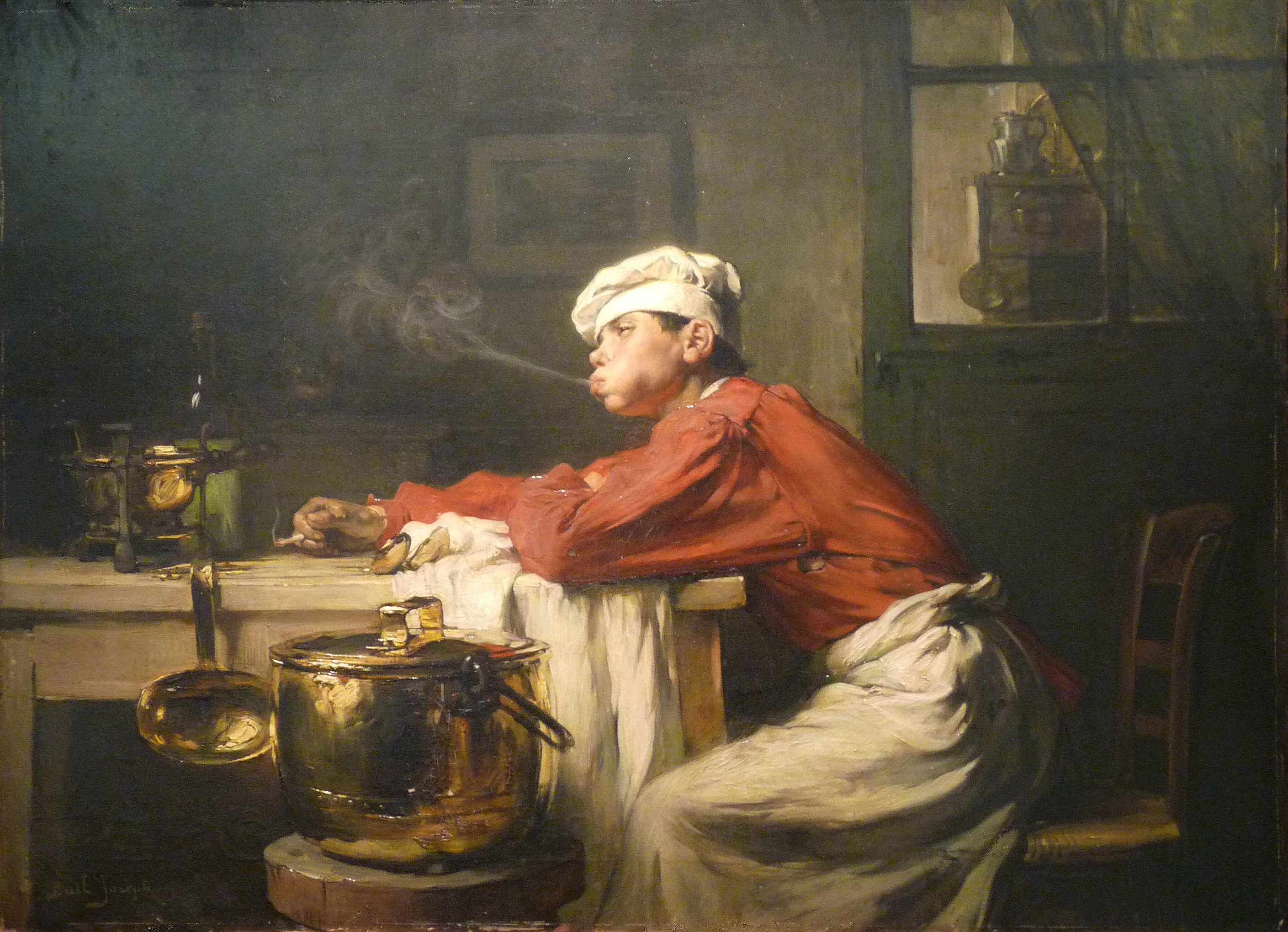 Farnientetitle QS:P1476,fr:"Farniente" label QS:Lfr,"Farniente"